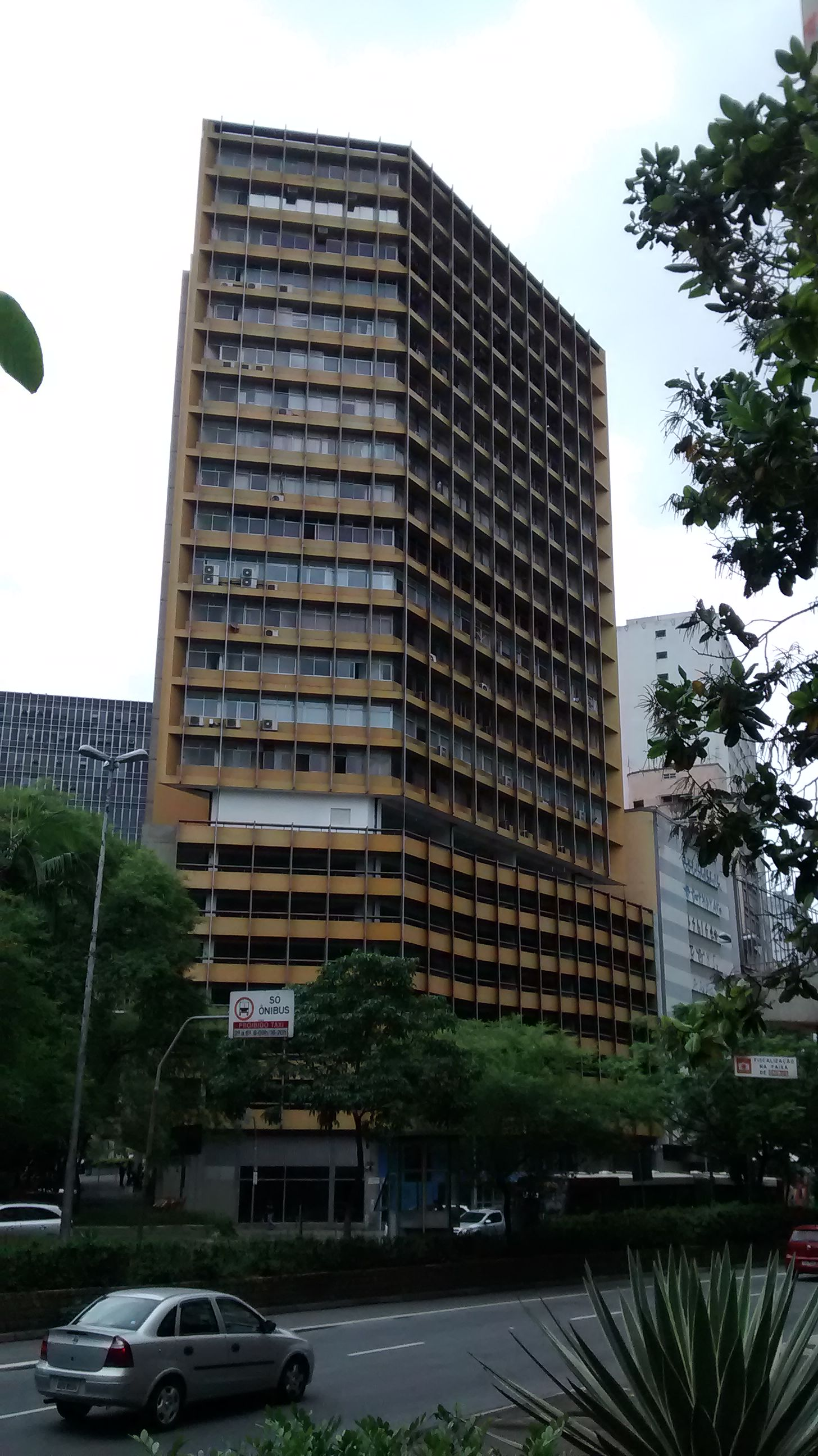 Edifício Joelma.